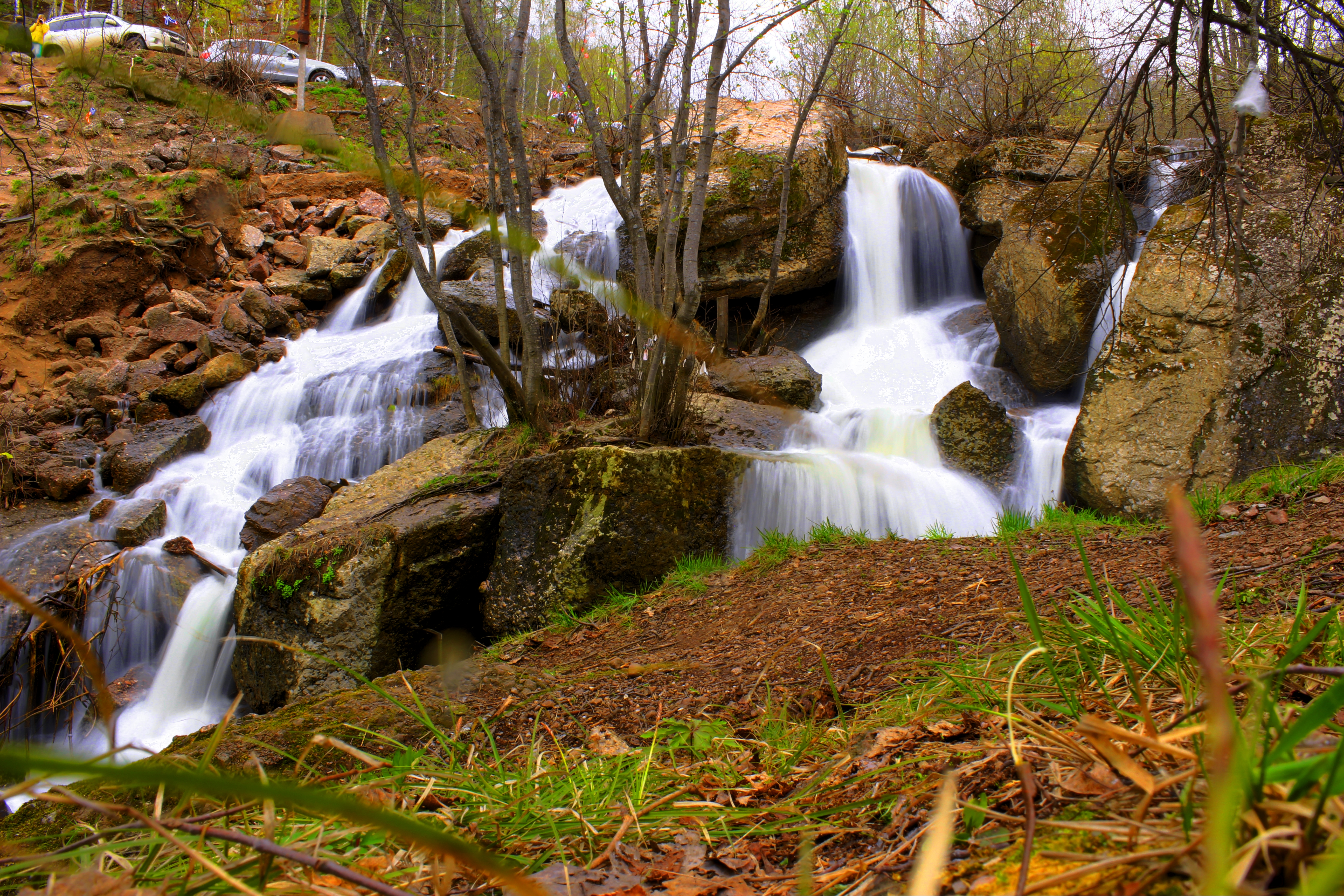 Водопад Кук-Караук, Ишимбайский район This image is related to the protected area of Russia number 0210151